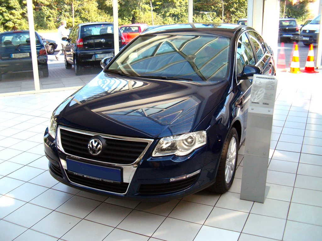 Volkswagen Passat Limousine - Frontansicht (Aufgenommen: September 2005)